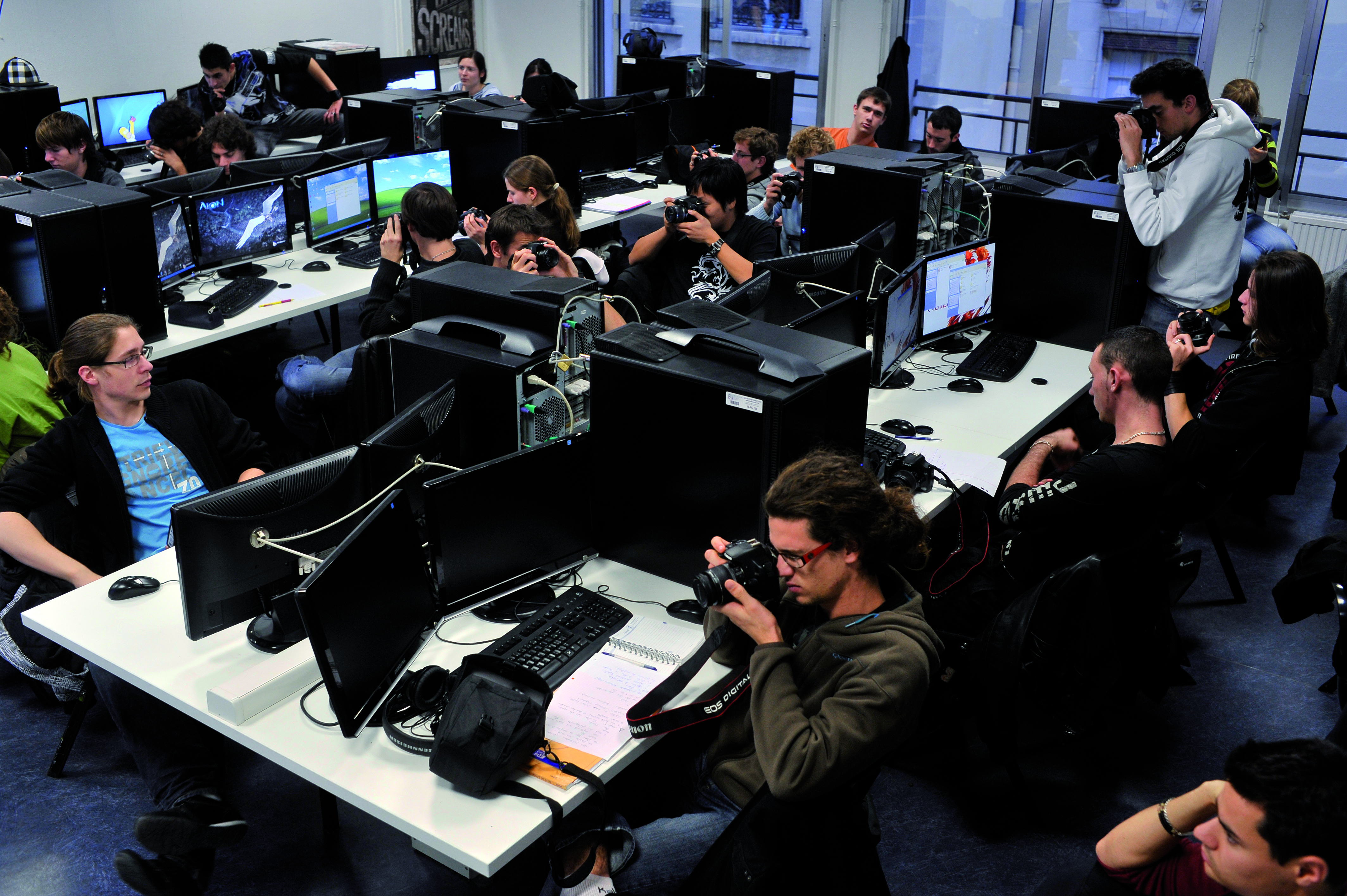 Etudiants de Bachelor Infographie 3D en salle informatique, Bellecour Ecole